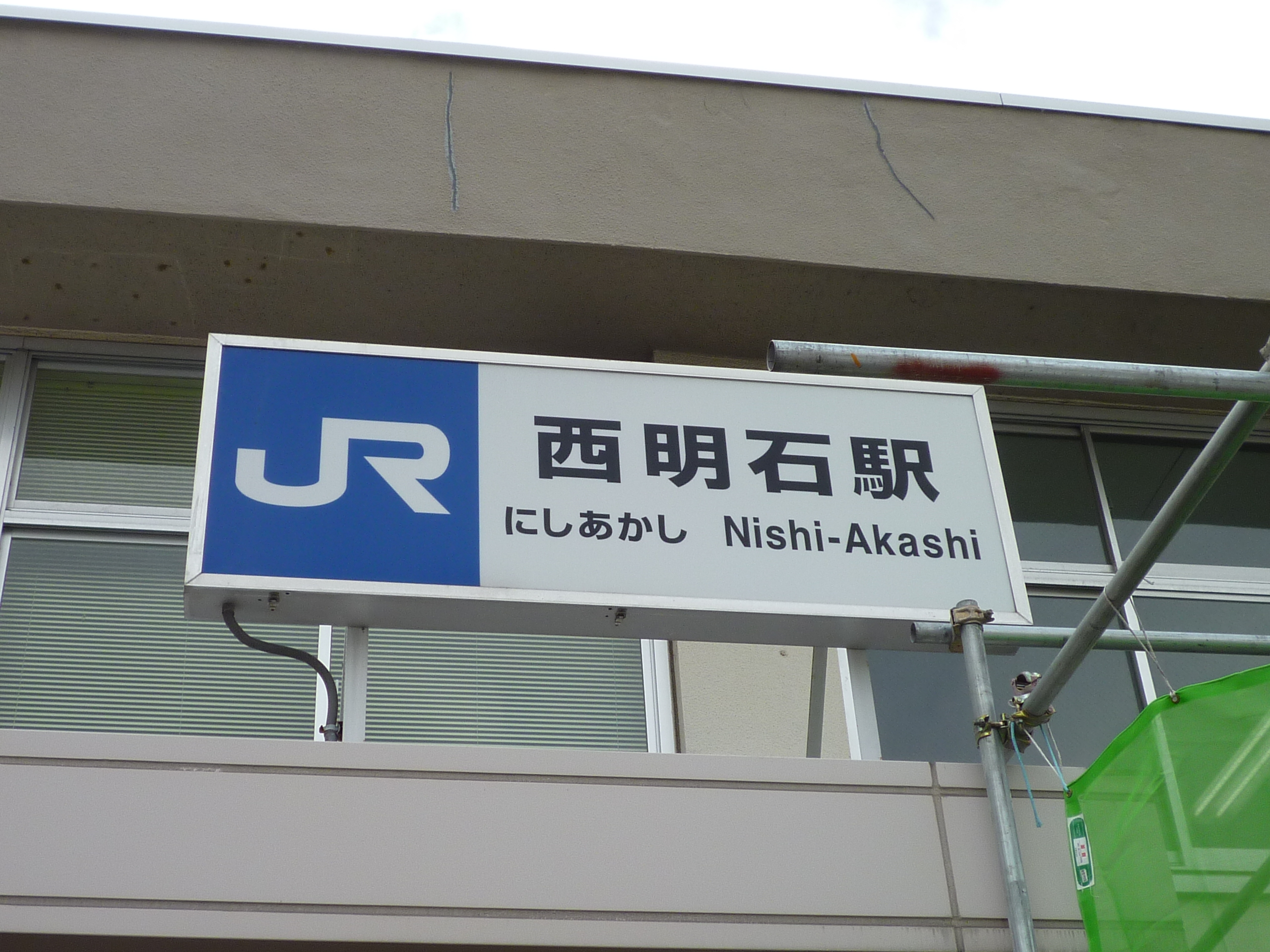 JR西日本西明石駅改札外駅名板（2010年10月27日）